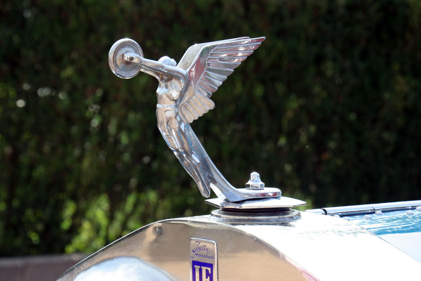 1929 Isotta Fraschini 8A Commodore_IMG_7261